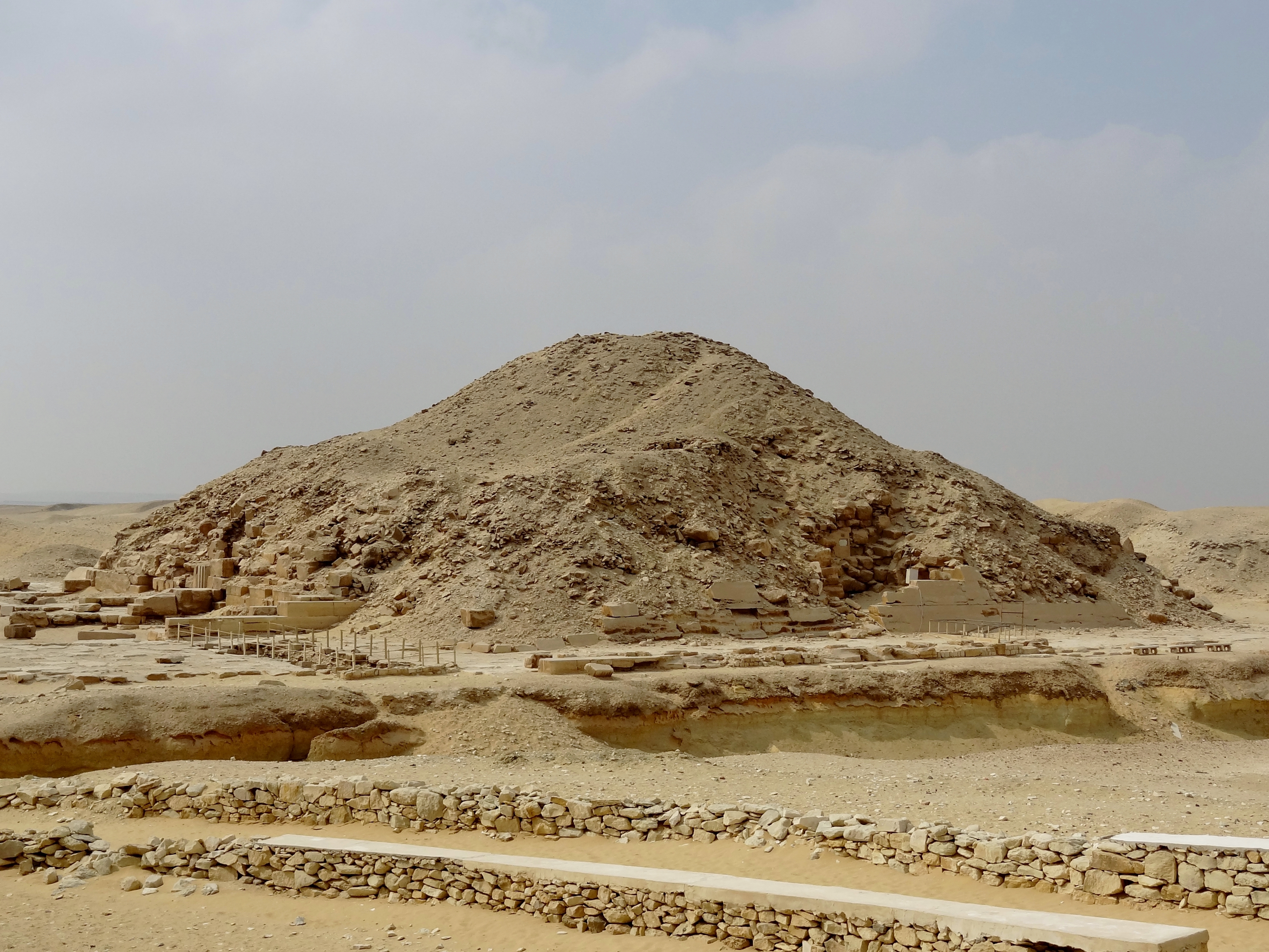 Pyramide des Unas in Sakkara, Ägypten